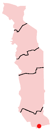 Lomé, Togo Location Map